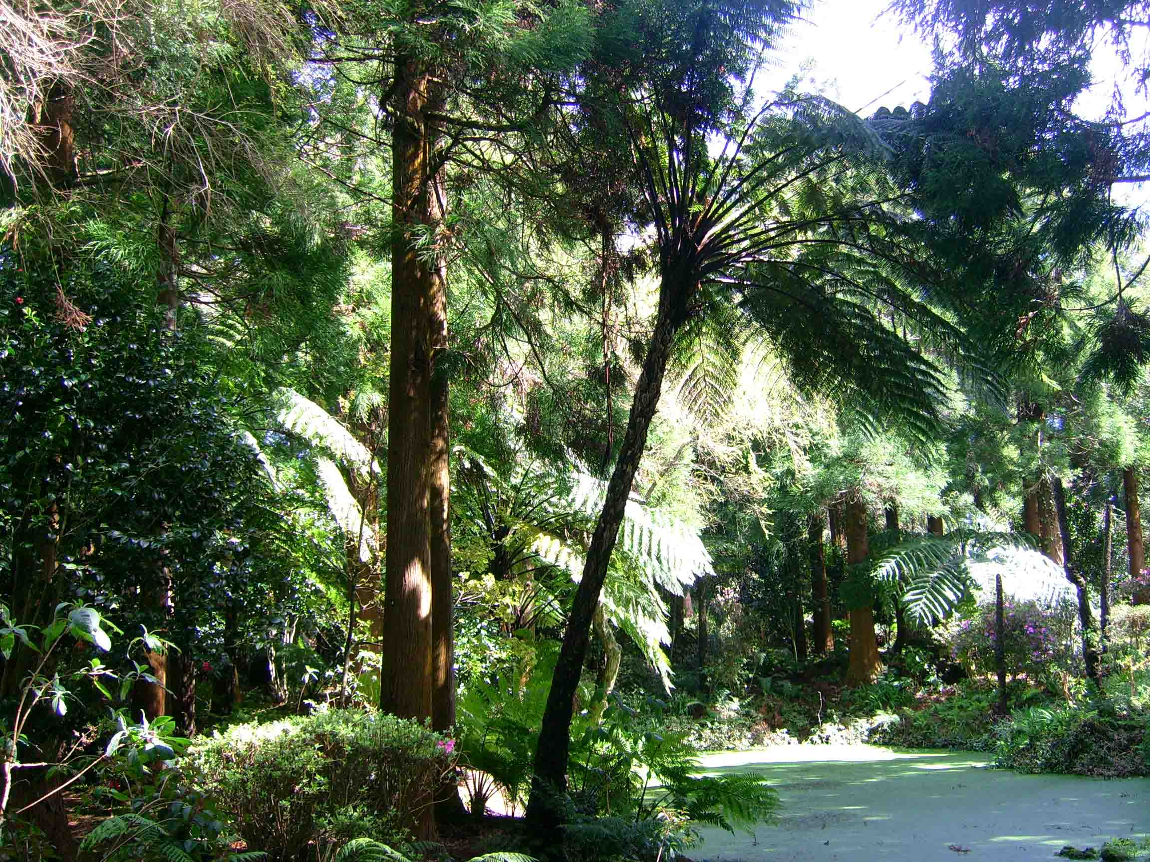 Fetos arbóreos no Parque Florestal das Sete Fontes, ilha de São Jorge, Açores, Portugal